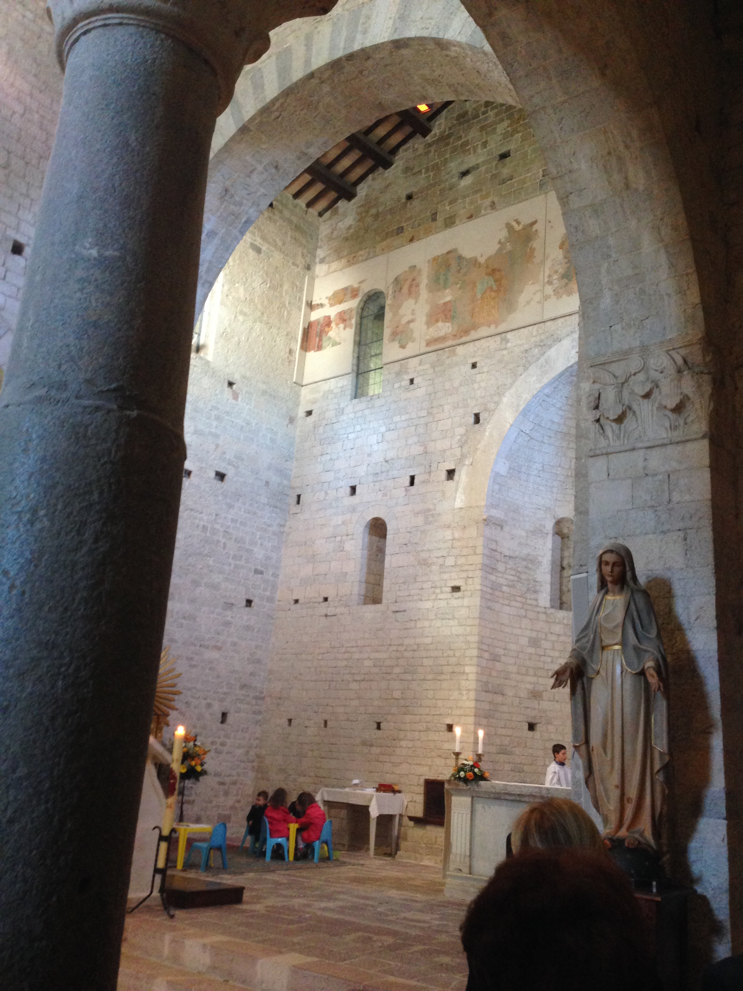 Chiesa di San Paolo. Spoleto. Interno